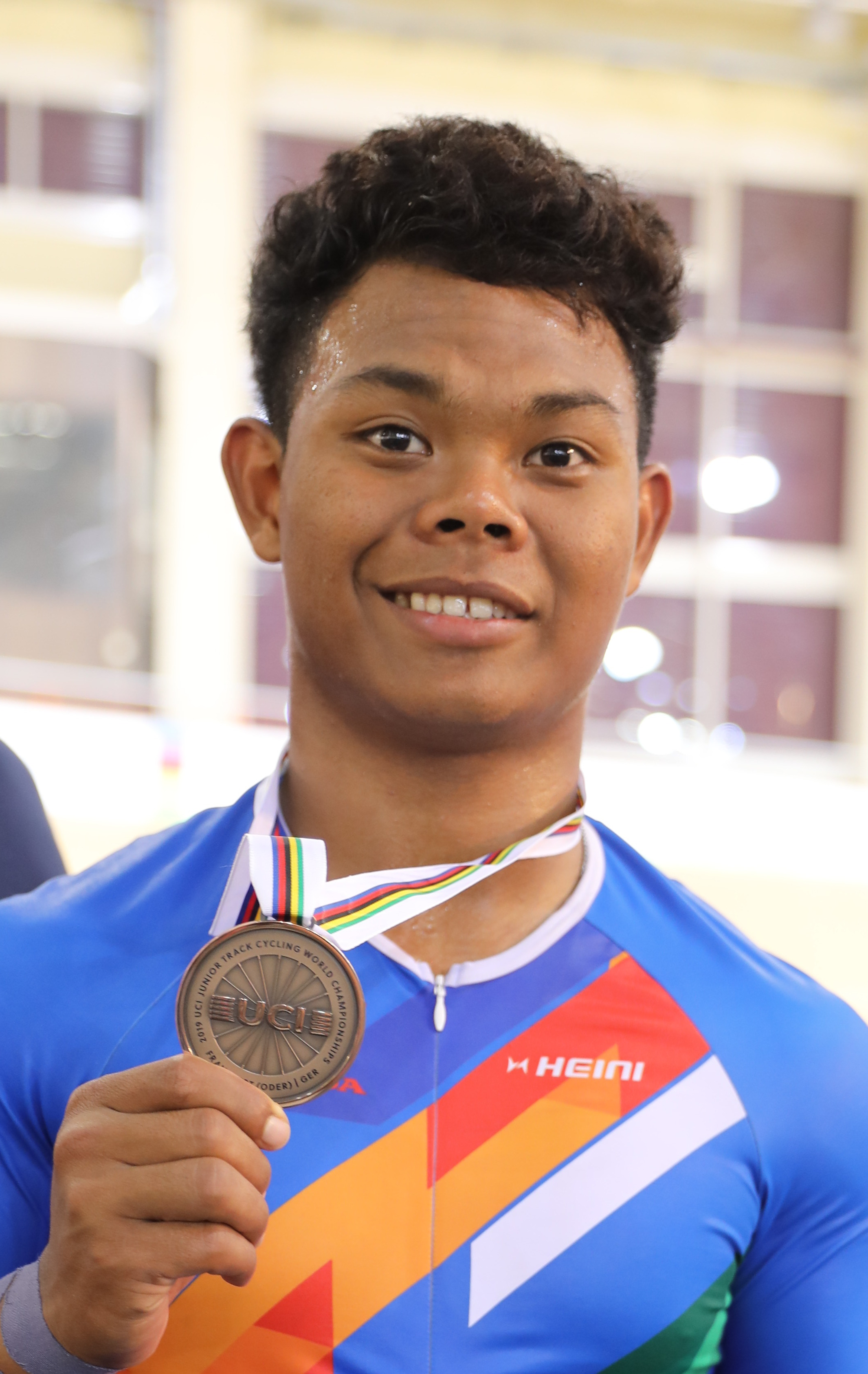 Esow Alban, Bahnradsportler aus Indien, Bronzemedaille im Keirin bei der Junioren-WM 2019